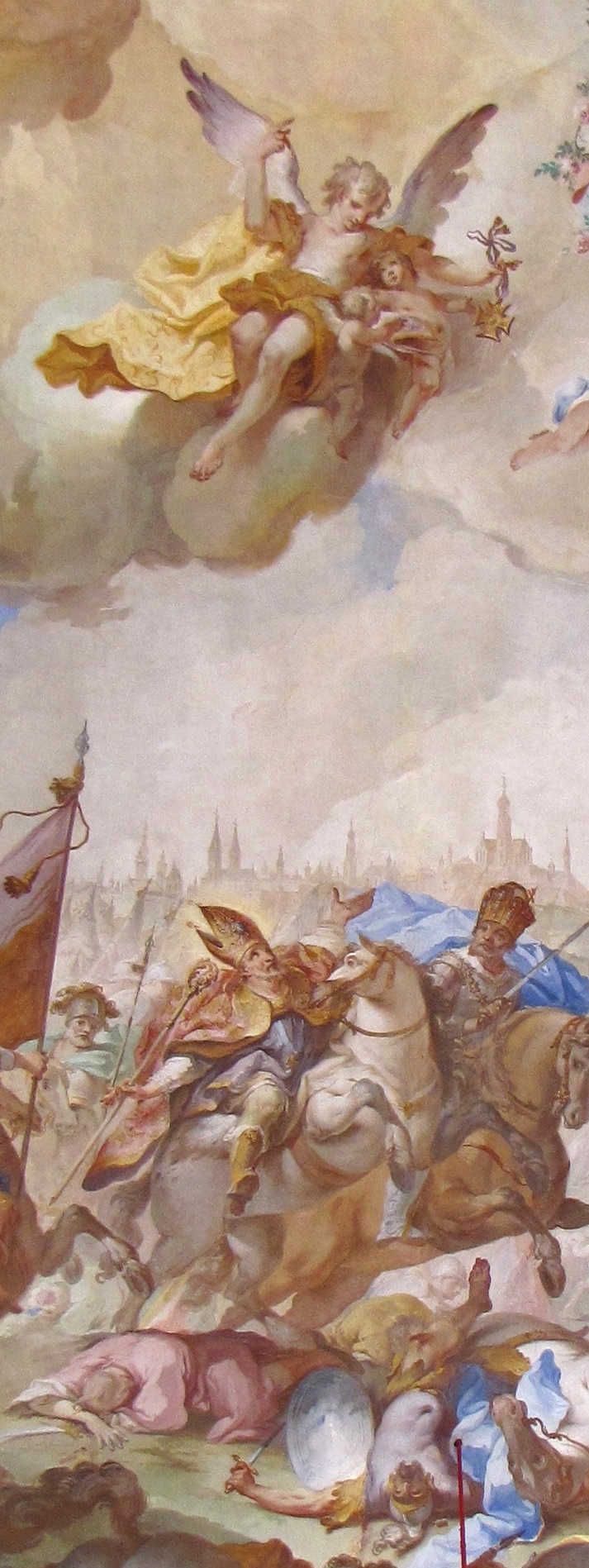 Die Schlacht auf dem Lechfeld, Deckenfresko von Balthasar Riepp, 1744, in der Pfarrkirche St. Ulrich, Seeg